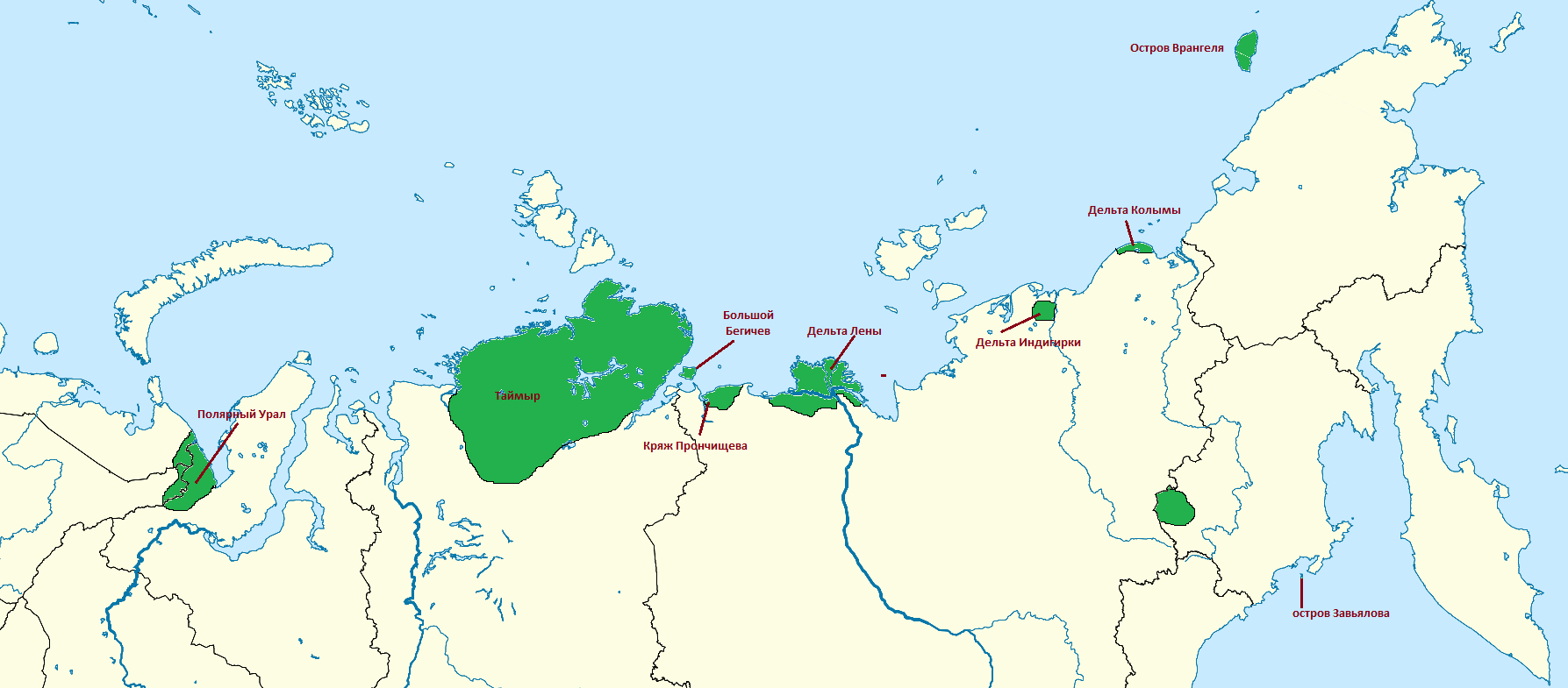 На карте представлен современный ареал обитания овцебыка в вольном состоянии на территории России по состоянию на 2018 год. Таймырский ареал указан с учетом сообщений о распространении ареала овцебыка от мыса Челюскина до реки Хатанги и то, что овцебыки заселили территорию к востоку от реки Пясины. Участок Полярный Урал указан с учетом сообщений , что овцебыка видели в Ненецком округе и в республике Коми. Указан и остров Завьялова в Магаданской области на который выпустили овцебыков в августе 2018 года. Ареал на севере Магаданской области указан приблизительно на основе информации о том, что овцебыков выпустили в 170 км от поселка Ягодное в сторону Якутии и их число составяляет примерно 70 особей.